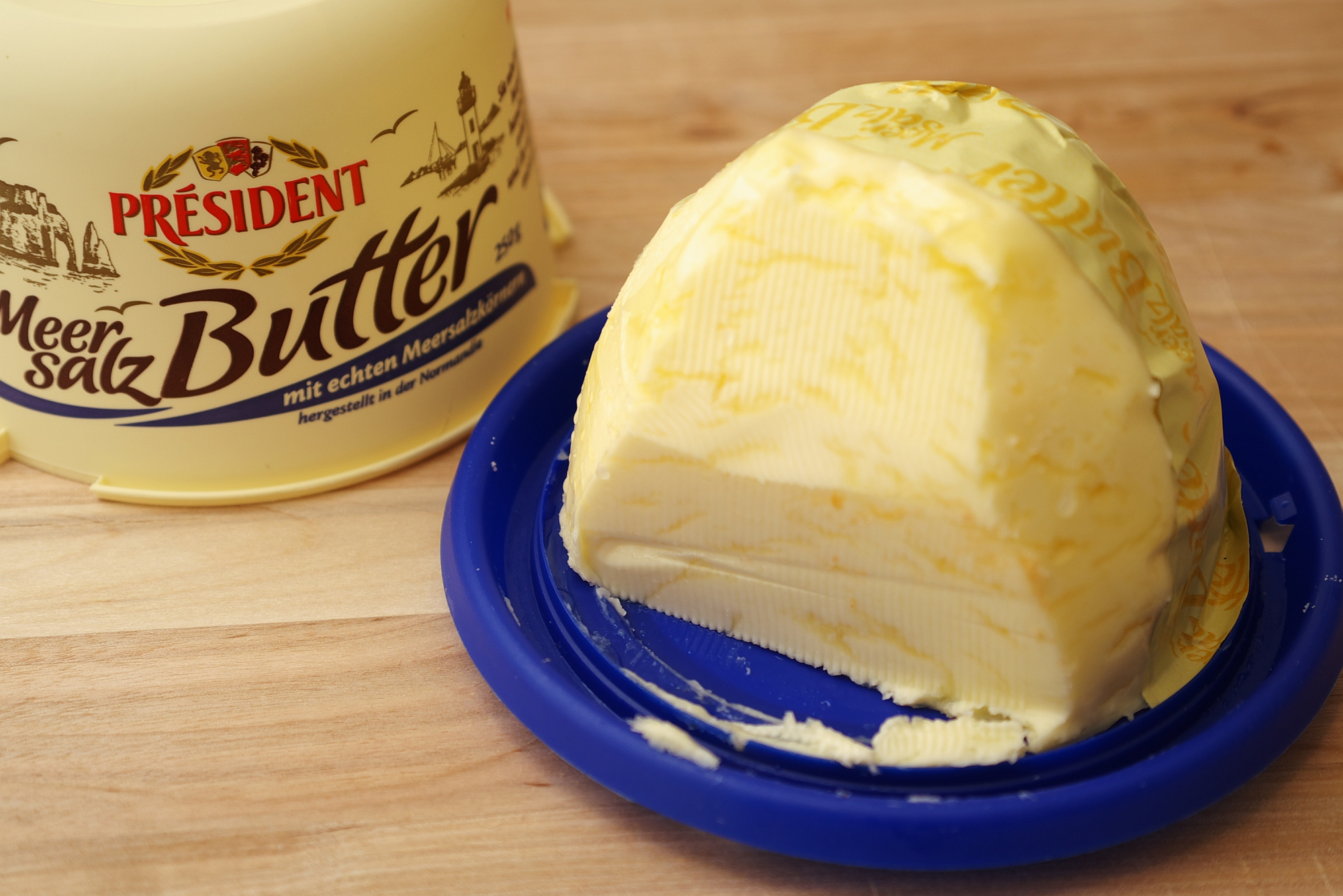 Butter mit Meersalz in Kristallen